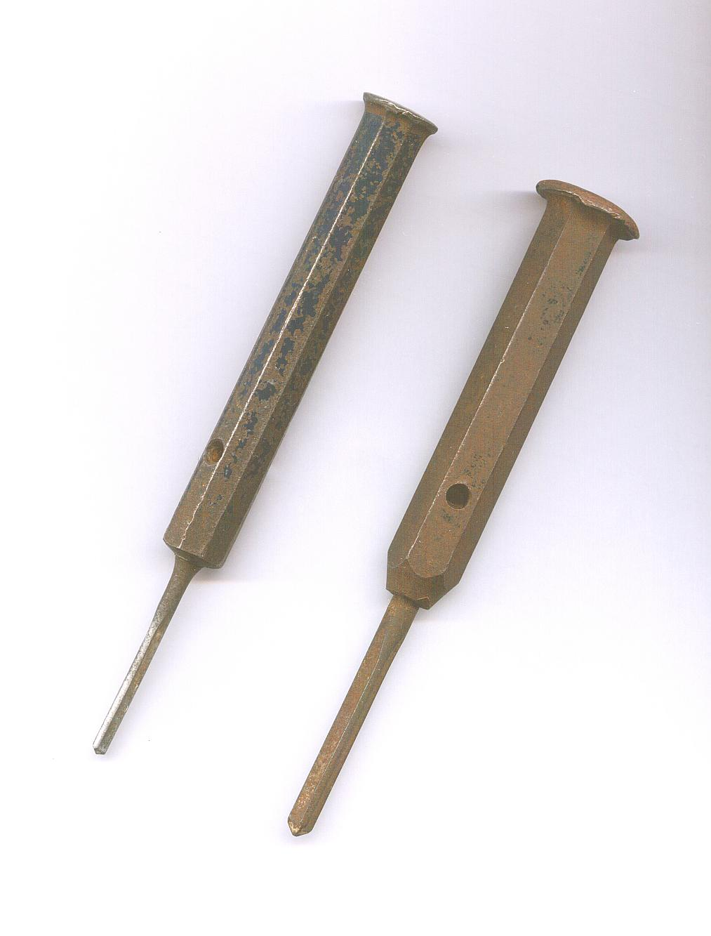 beitels, ouderwetse beitels om handmatig gaten in muren te boren, Rawlplugbeitels, familiebezit, eigen foto (public domain)